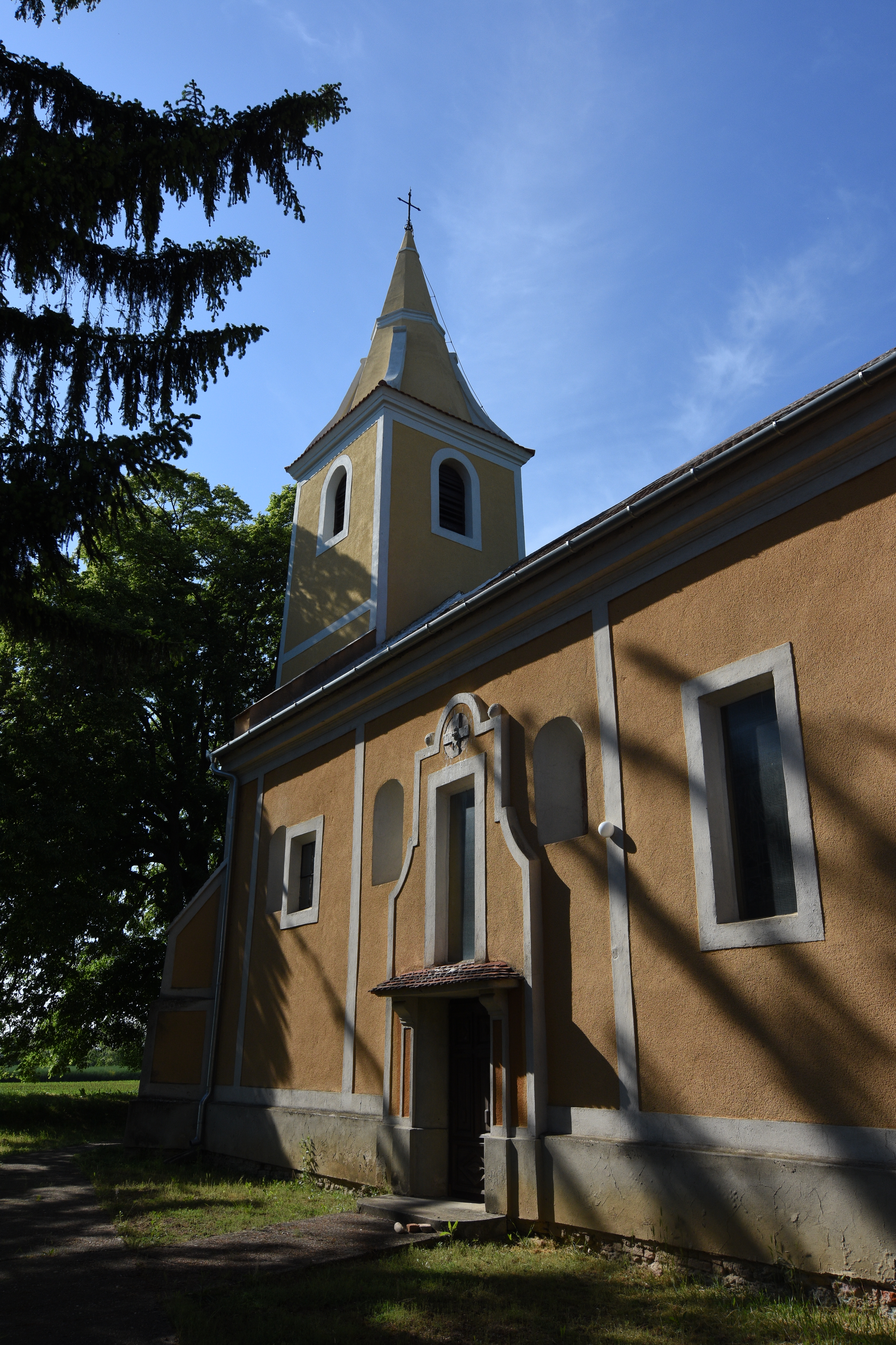 Szent Kozma és Damján Meggyeskovácsi